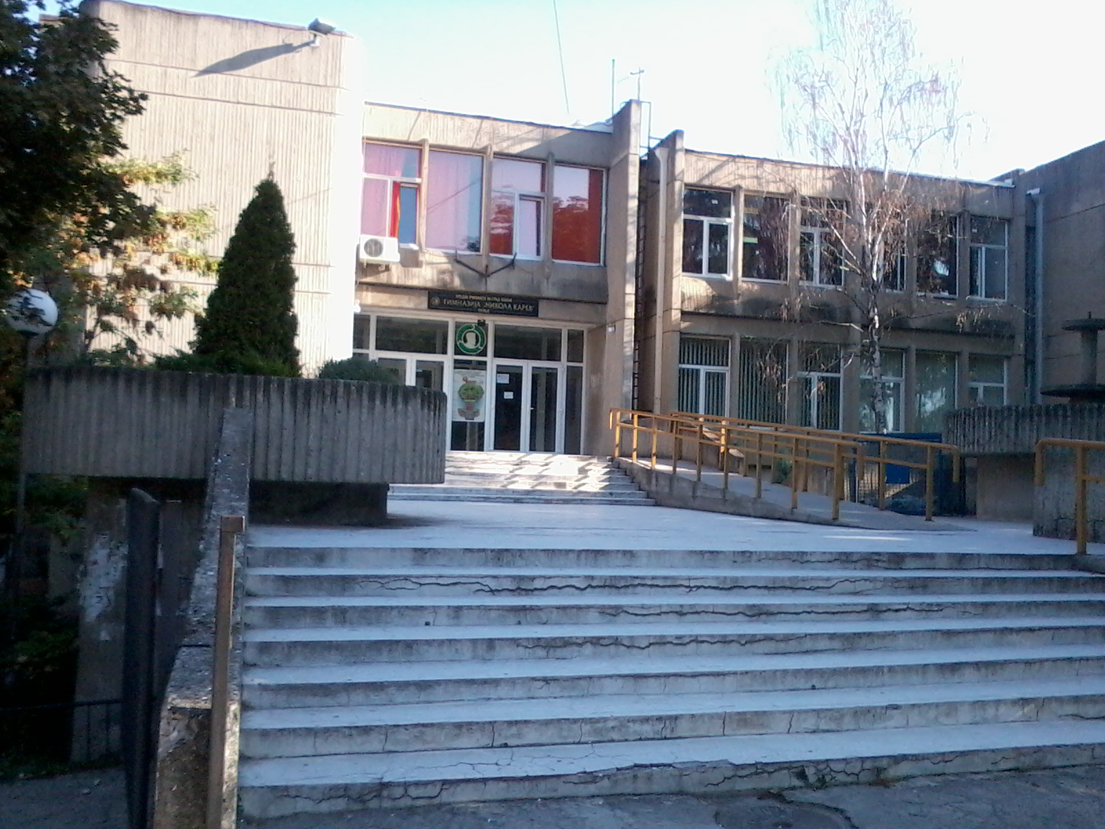 picture made by mobile Skopje. R of Macedonia , Скопје/Скопље Р.Македонија ( СУ на ГРАД СКОПЈЕ "НИКОЛА КАРЕВ" )